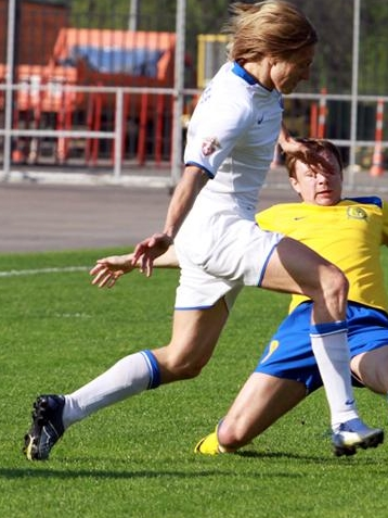 Кренделев Вячеслав игрок Балтики